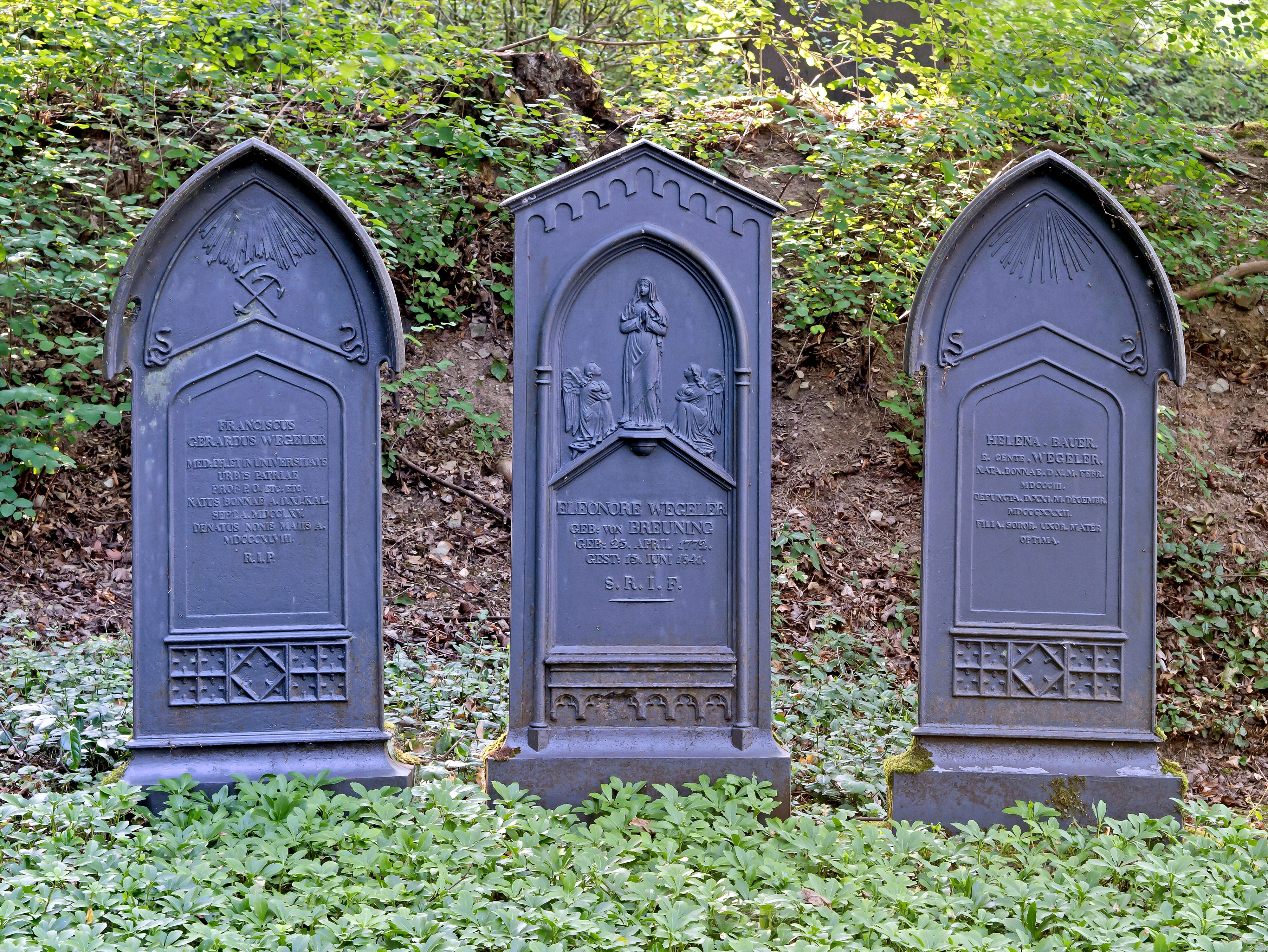 Die Grabstätte der Familie Franz Gerhard Wegeler, Freund, Weinlieferant und erster Biograph Beethovens, seiner Gattin Eleonore von Breuning, Klavierschülerin Beethovens in Bonn (Leonorenouvertüre) und ihrer Tochter Helena Bauer. Die gusseisernen Grabplatten wurden in der Sayner Hütte hergestellt und stehen heute noch an ihrer ursprünglichen Stelle.